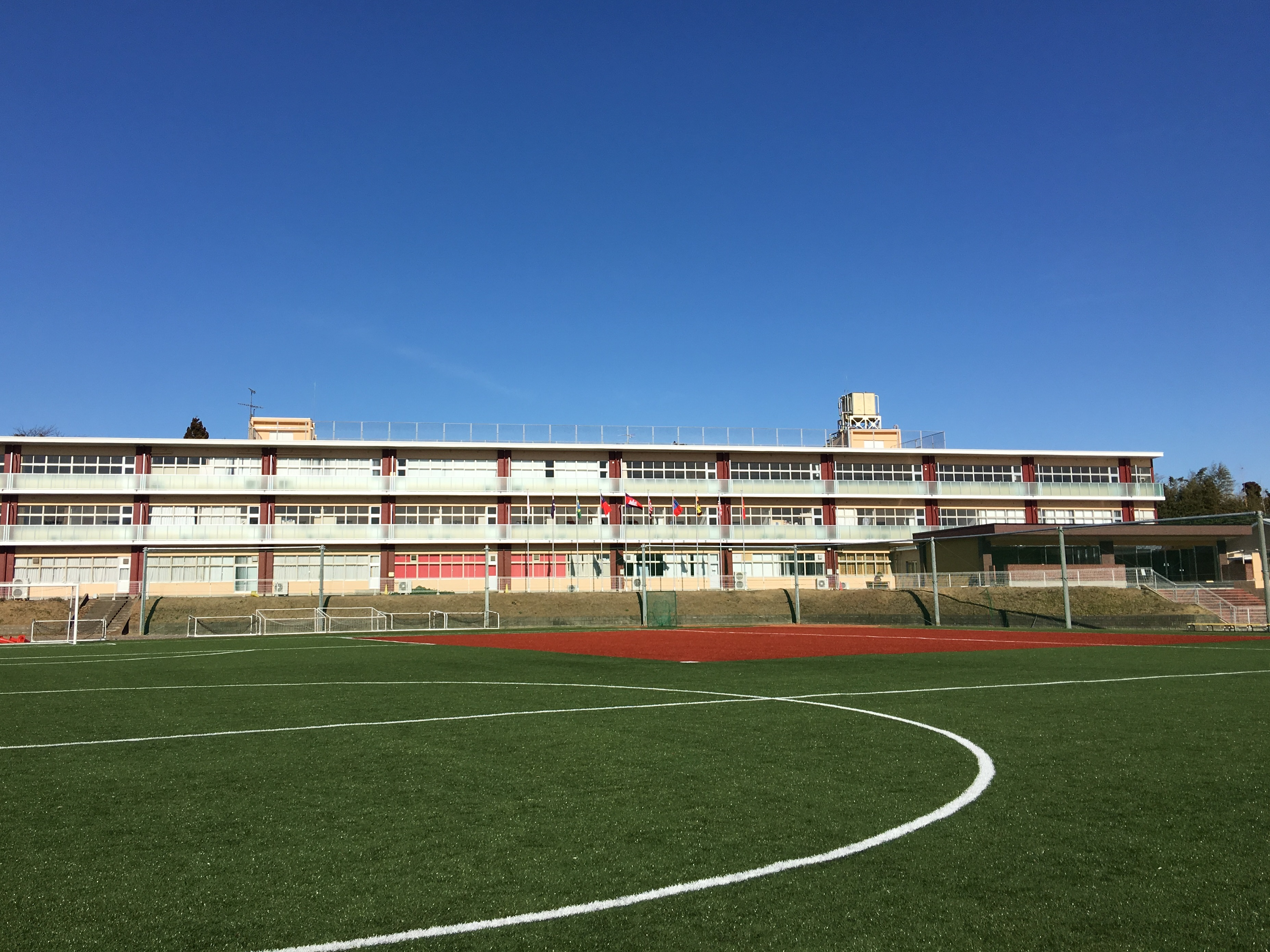 日本ウェルネススポーツ大学1号館